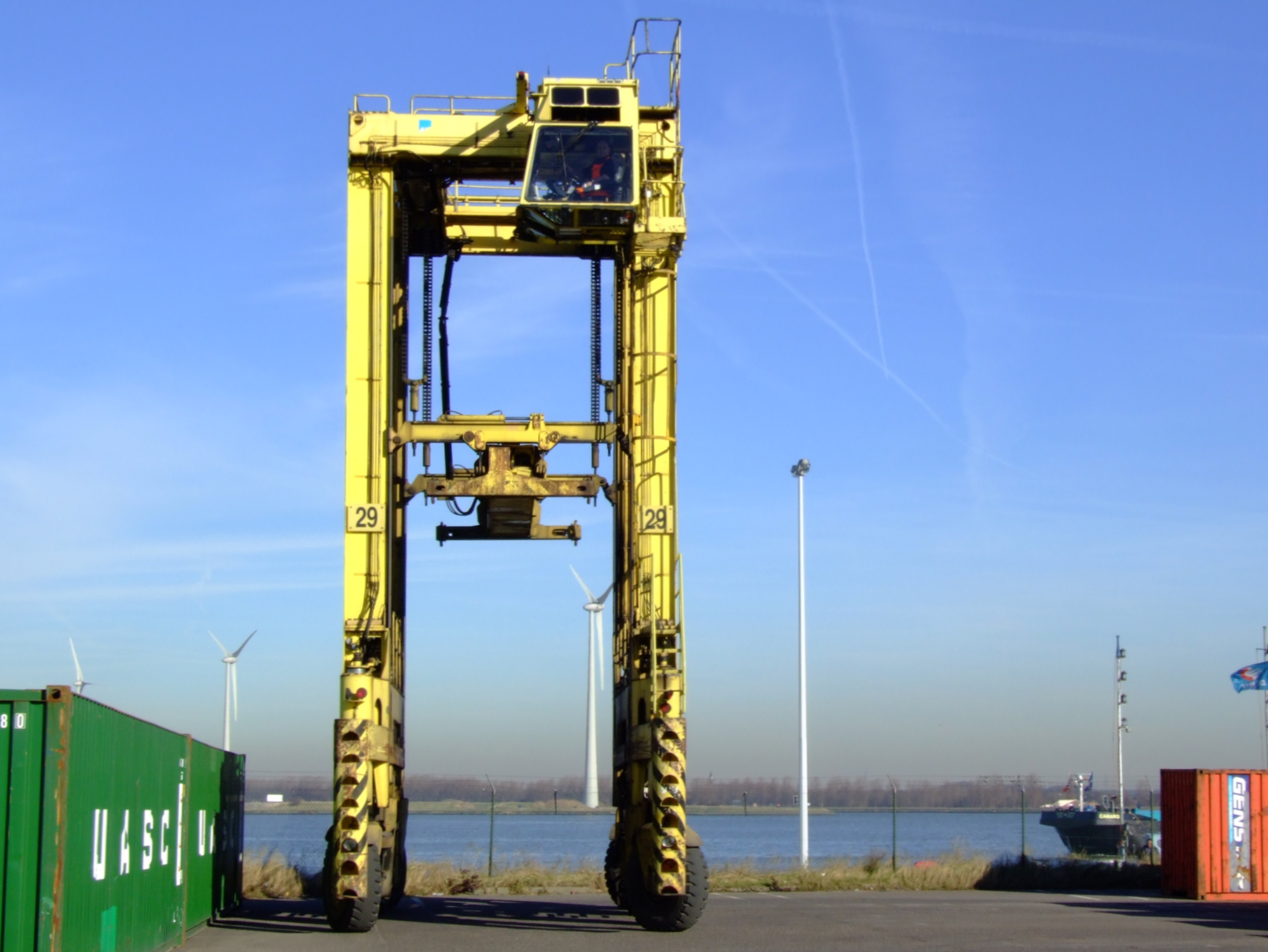 SISU Valmet 44011 Straddle carrier container mover.